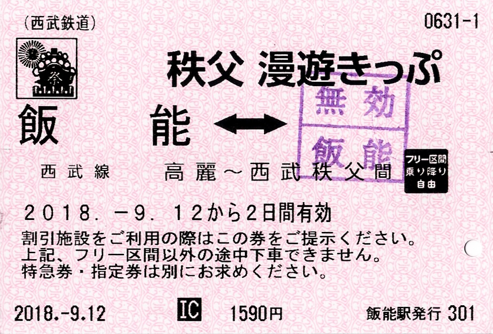 西武鉄道発行の秩父漫遊きっぷ